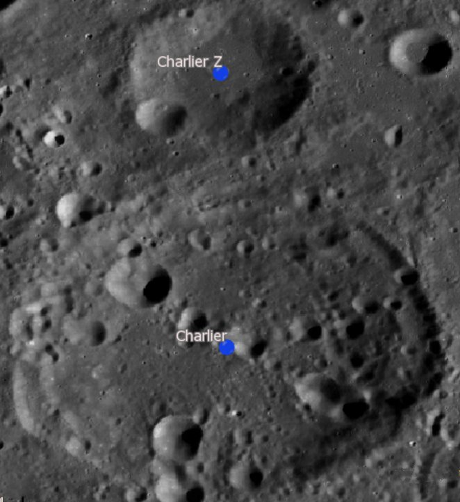 Cráter Charlier (LRO)